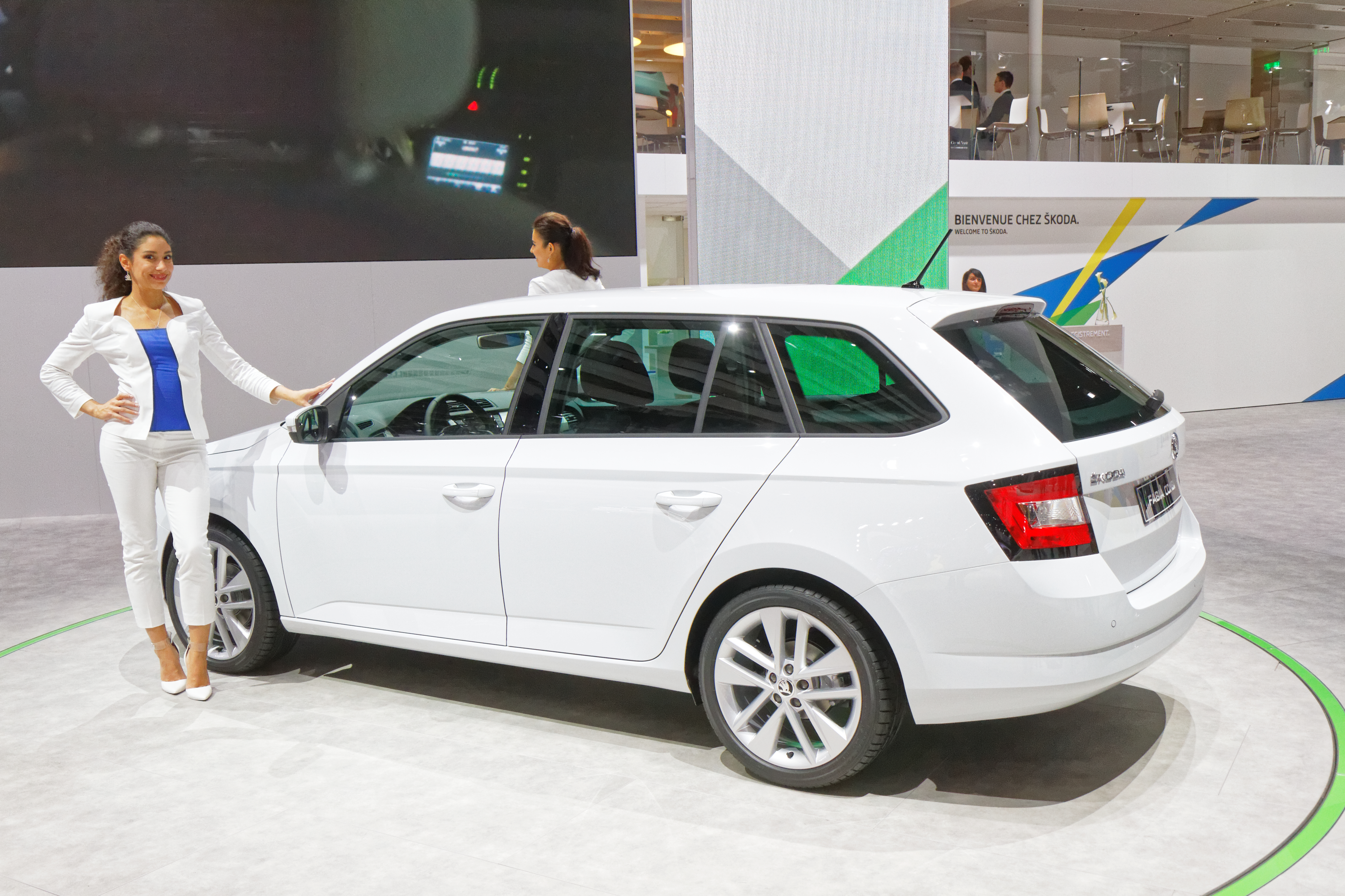 Une Skoda Fabia Combi présentée lors du mondial de l'automobile de Paris 2014.